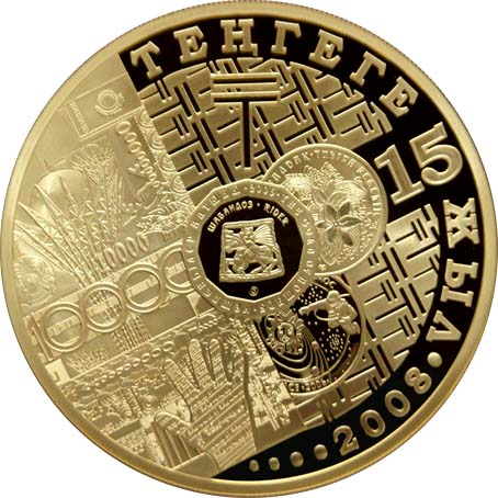 Памятная монета Республики Казахстан «15-летие введения национальной валюты» - 50000 тенге - золото - реверс